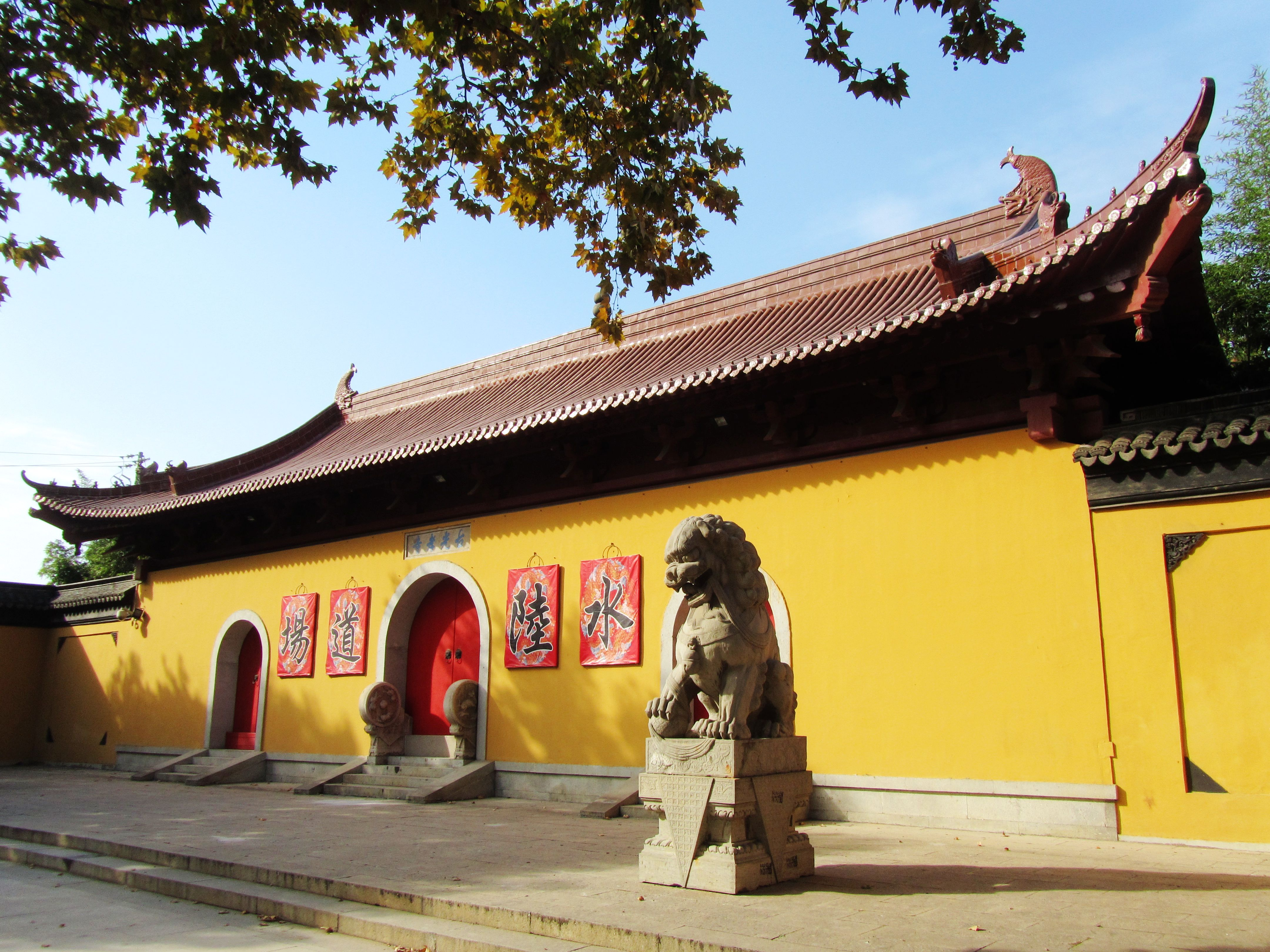 泰州光孝寺山门殿。